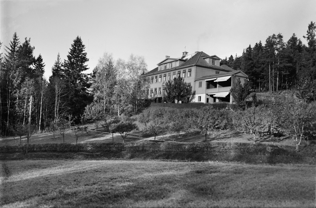 Nordstrand tuberkulosehjem fotografert i 1941